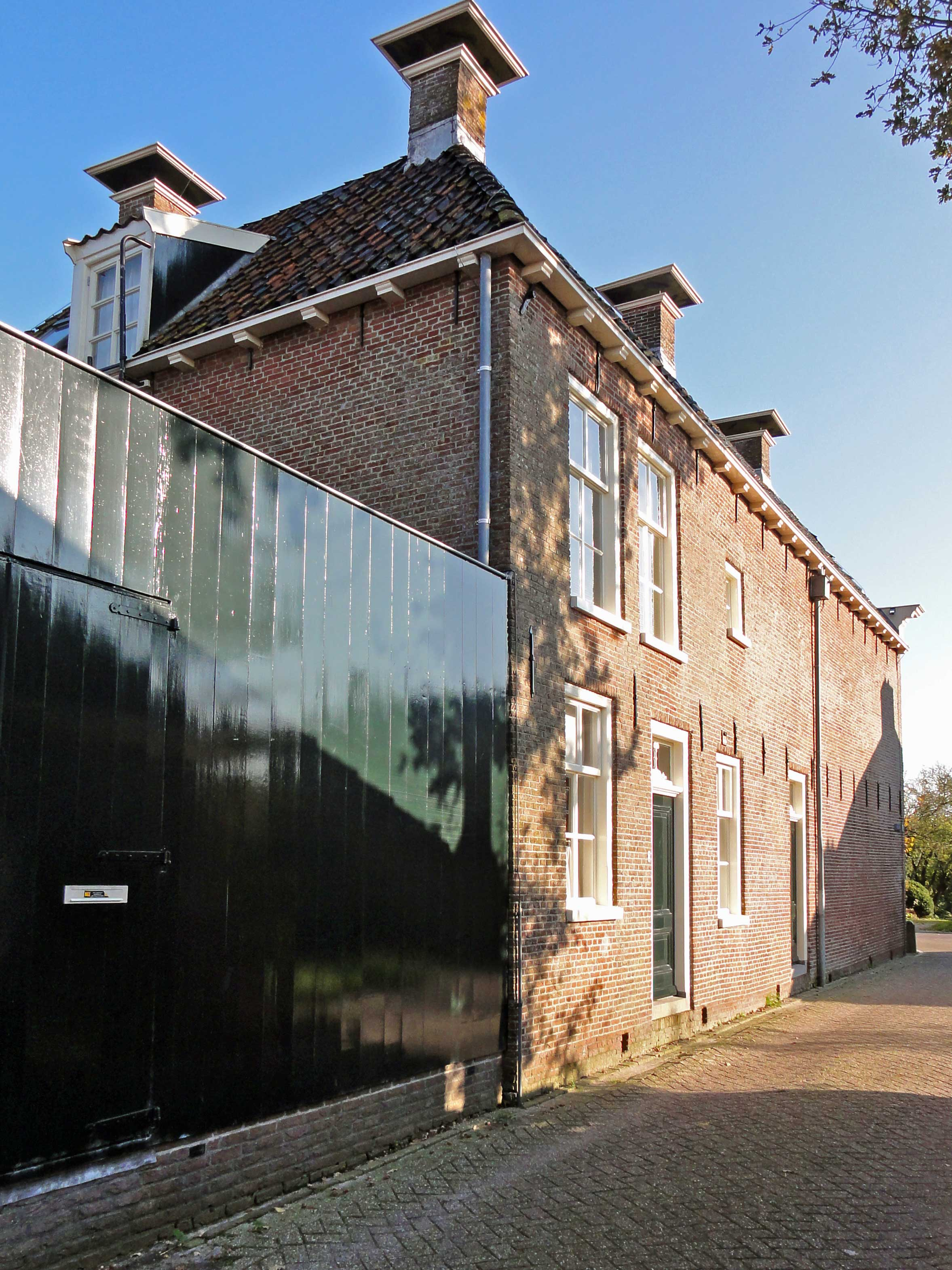 Voormalig rechthuis "De Beverkooy" Molenweg 2 (achterzijde van Buren 19) in Oosterzee